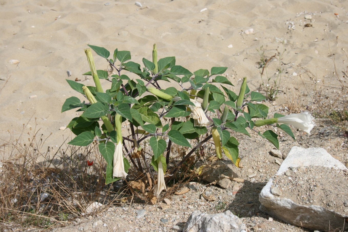 Datura inoxia: Habit